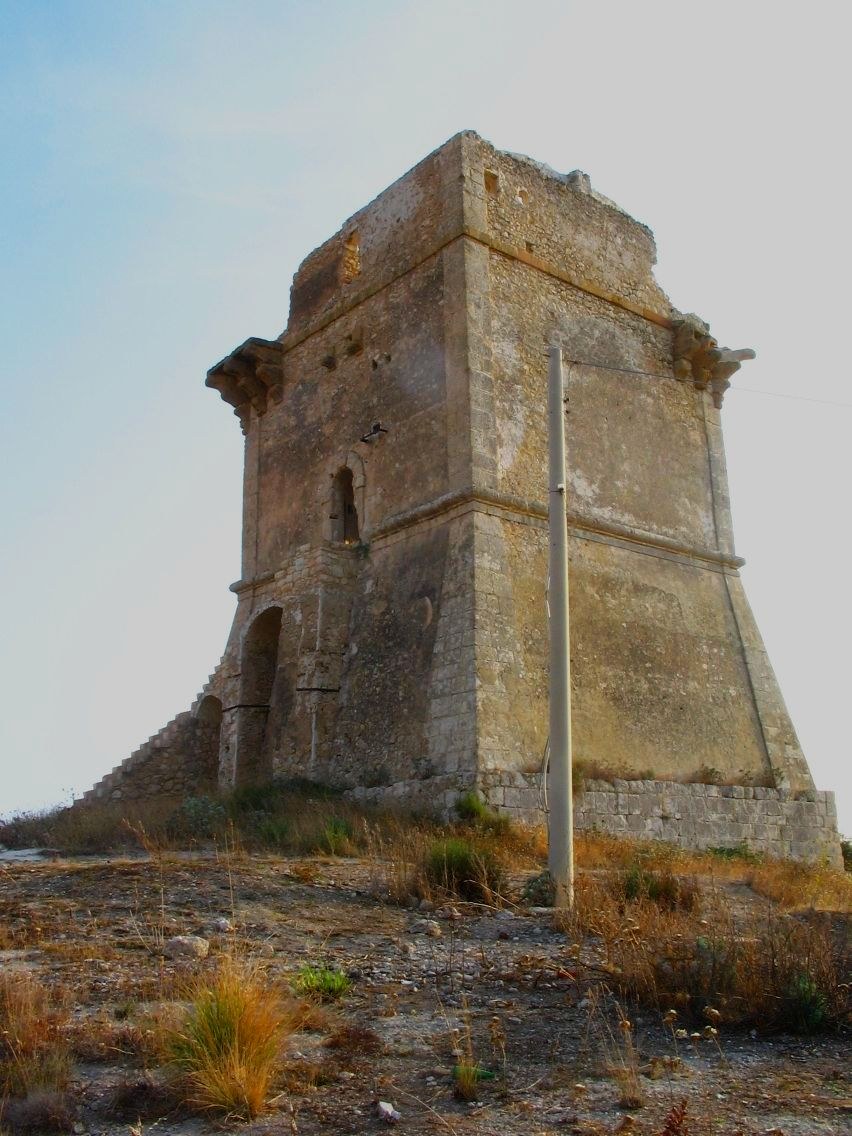 La Torre di Manfria, nei pressi di Gela, opera di Camillo Camilliani - XVI secolo.